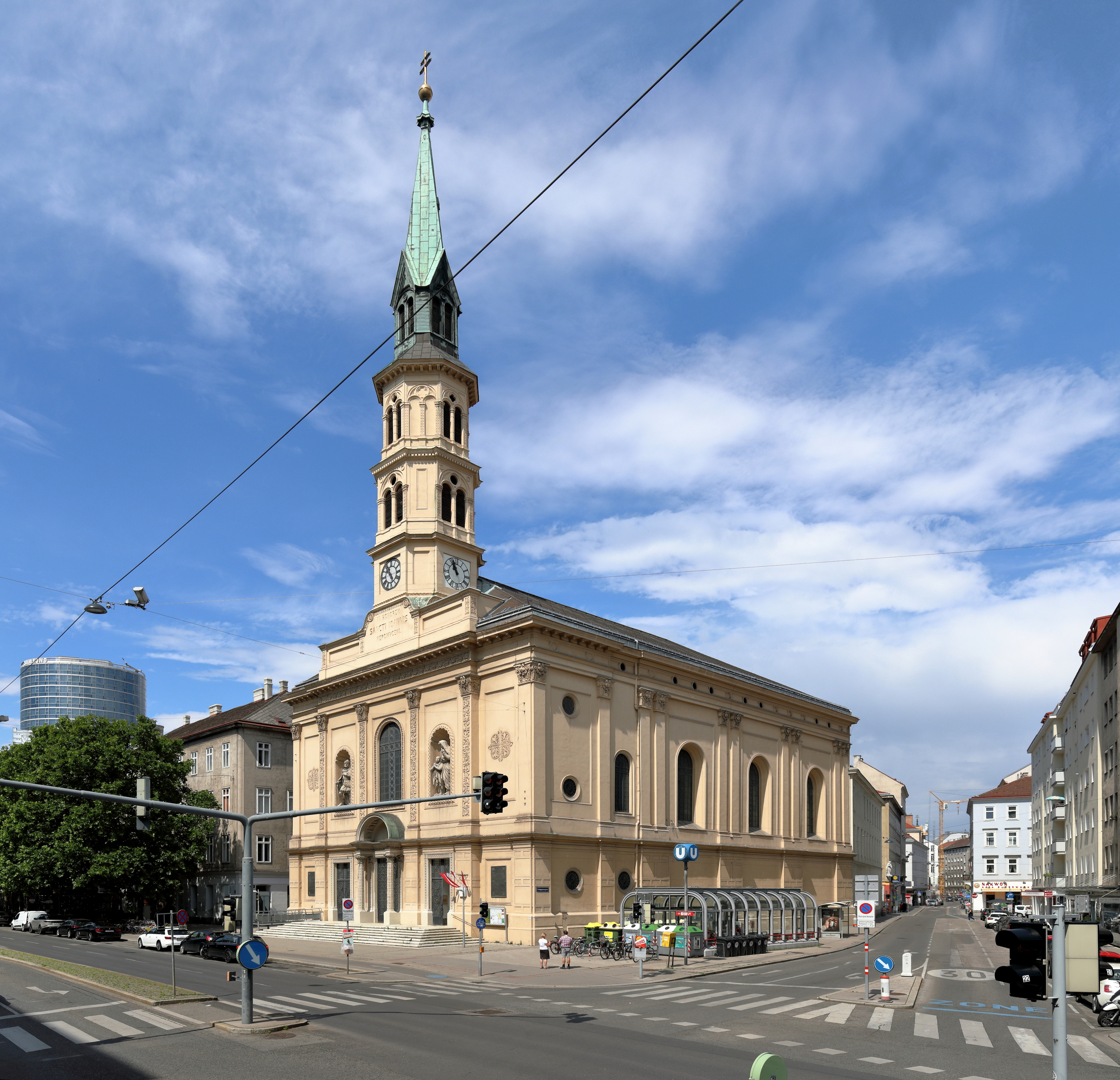 Ostansicht der Johannes-Nepomuk-Kirche an der Ecke Praterstraße/Rotensterngasse im 2. Wiener Gemeindebezirk Leopoldstadt.Die Kirche wurde ab 1841 nach Plänen von Karl Rösner in Formen des romantischen Historismus errichtet und am 18. Oktober 1846 geweiht. Ein sich nach oben verjüngender Turm dominiert die Fassade, an der sich in Mauernischen die zwei überlebensgroße Figuren hl. Ferdinand und hl. Anna mit Kind befinden; eine Bezugnahme auf den Kaiser Ferdinand I. und seine Gattin Maria Anna von Savoyen. 1945 wurde die Kirche durch Bombentreffer schwer beschädigt.